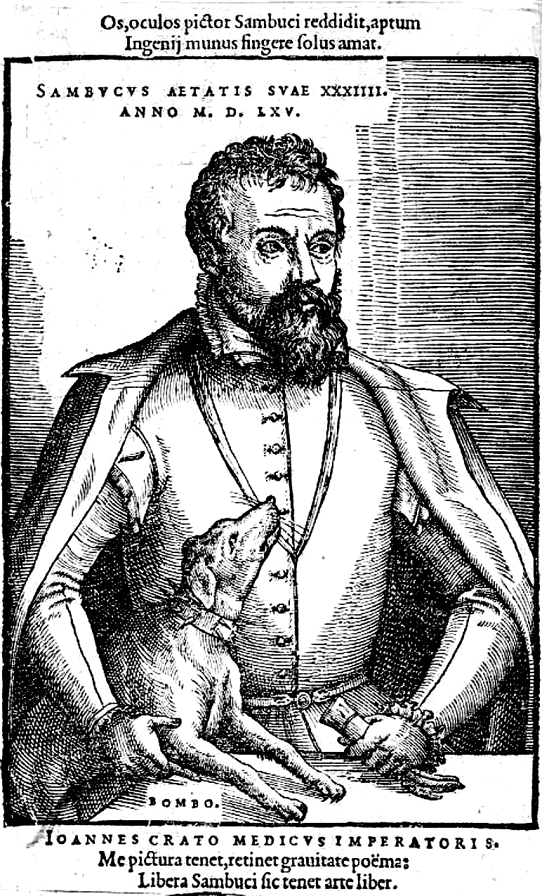 Johann Sambucus (János Zsámboky), * 25. Juli oder 30. Juli 1531 in Tyrnau (Trnava, Nagyszombat), † 13. Juni 1584 in Wien, mit seinem Hund Bombo, 1565